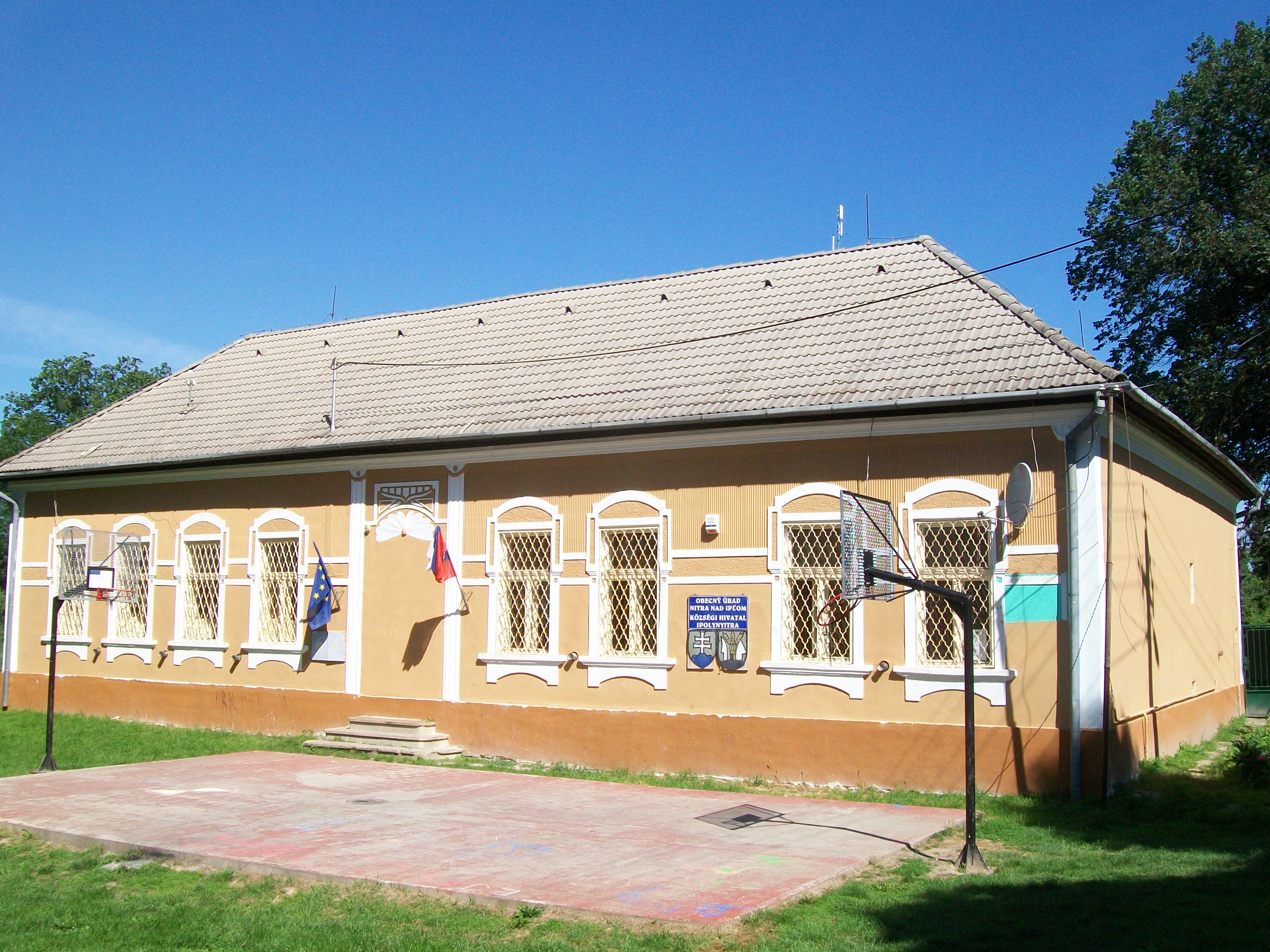 Obecný úrad v Nitre nad Ipľom